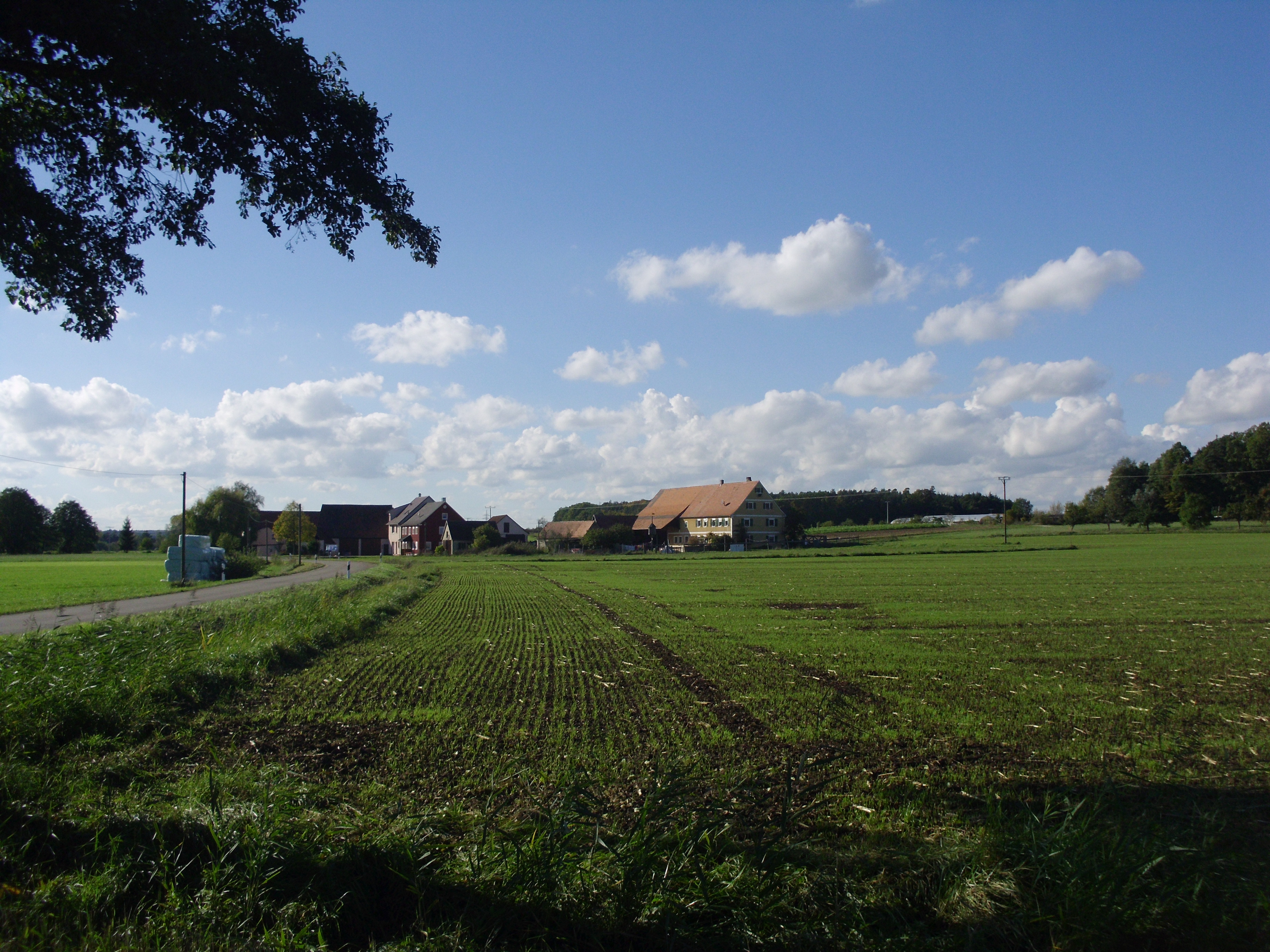 Irrebach, Ortsteil von Weidenbach im Landkreis Ansbach